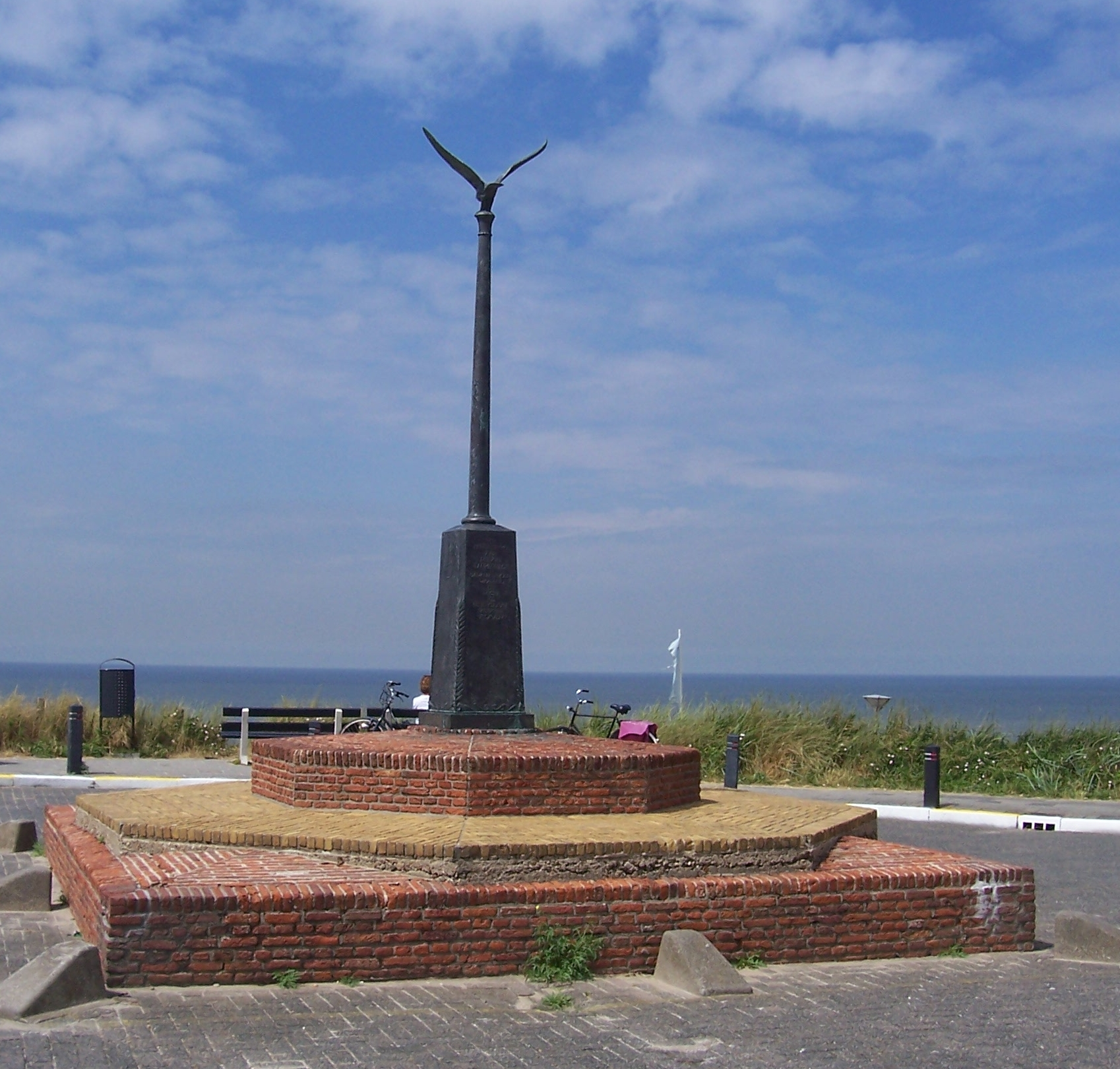 1948: Bevrijdingsmonument (pilaar met vogel), natuursteen / brons, Koningin Astridboulevard, Noordwijk aan Zee.